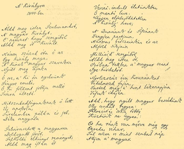 Bajza József A királyra c. versének kézirata